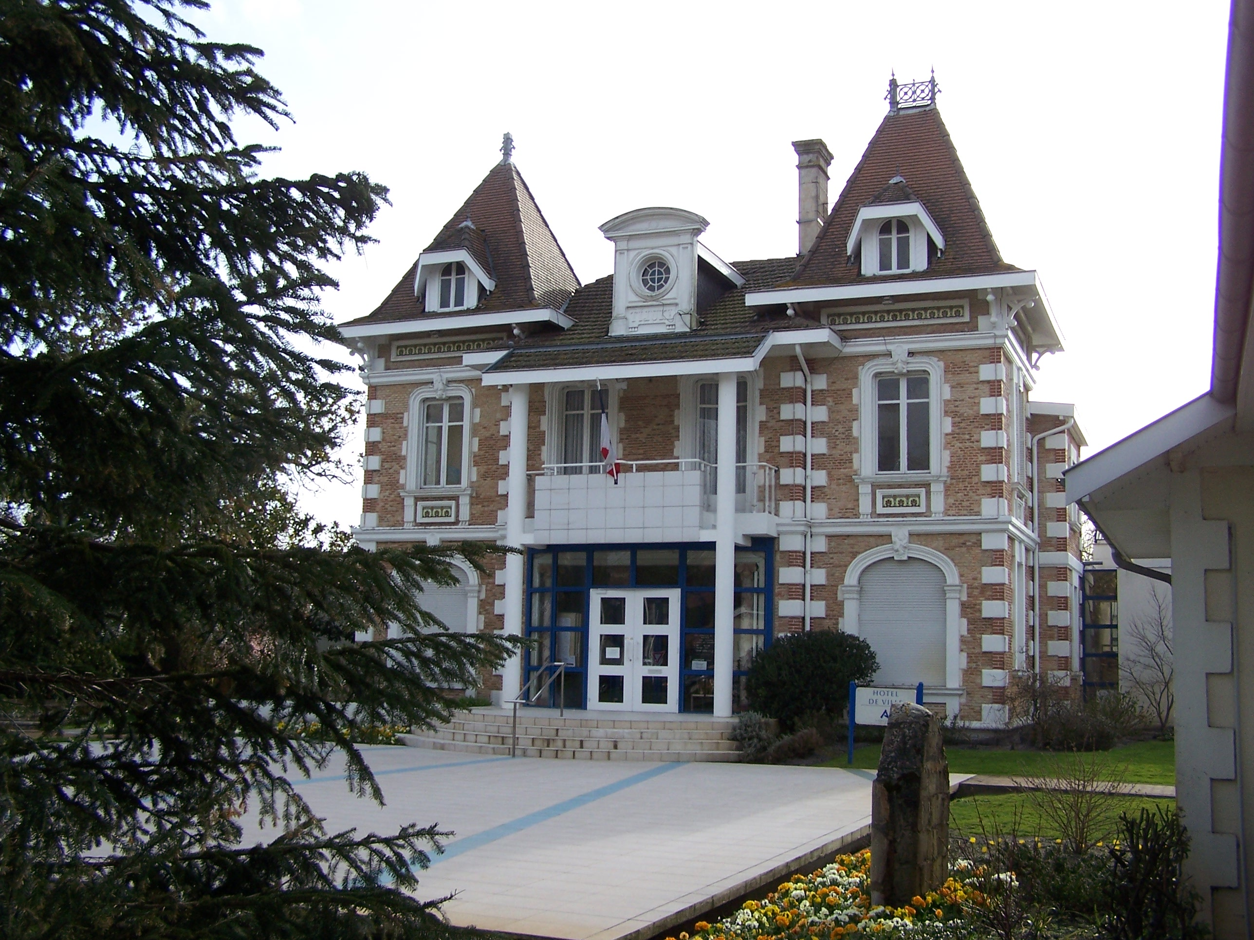 Mairie d'Andernos-les-Bains, Gironde, France